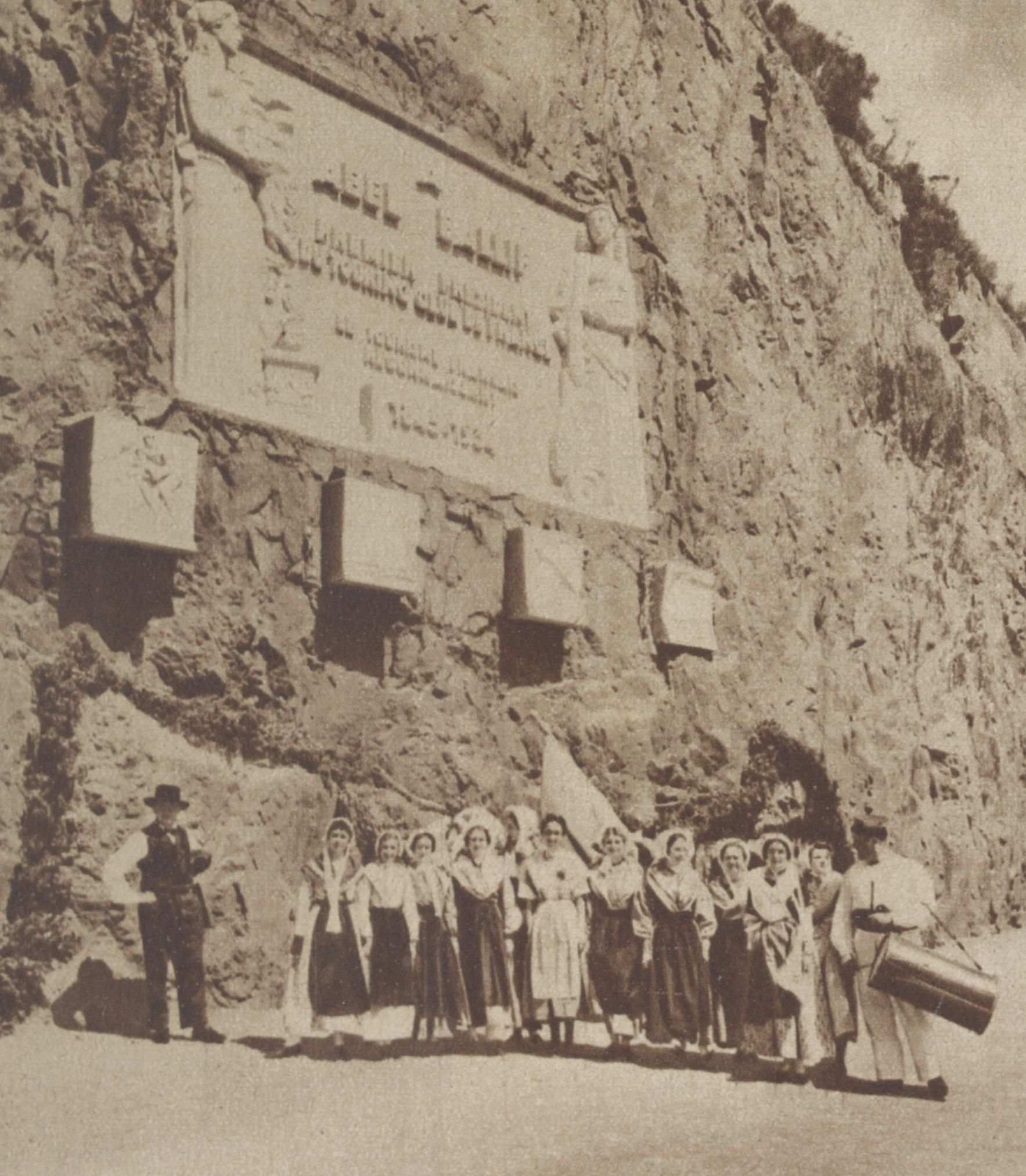 Inauguration le 26 juin 1939 du monument en hommage à Abel Ballif au Trayas, réalisé par le sculpteur Antoine Sartorio et l'architecte Paul Tournon. Des tambourinaires et des danseuses de l'Académie provençale posent devant le monument, installé dans la roche au-dessus de la Corniche d'Or. L'image principal de la sculpture représente deux personnages féminins de style antique, qui forment une allégorie du tourisme. Celle de gauche tient dans ses mains une petit monument et celle de droite une petite automobile. Sous la sculpture principale, quatre petits reliefs carrés représentent un cycliste, un voilier, un avion et une voiture.